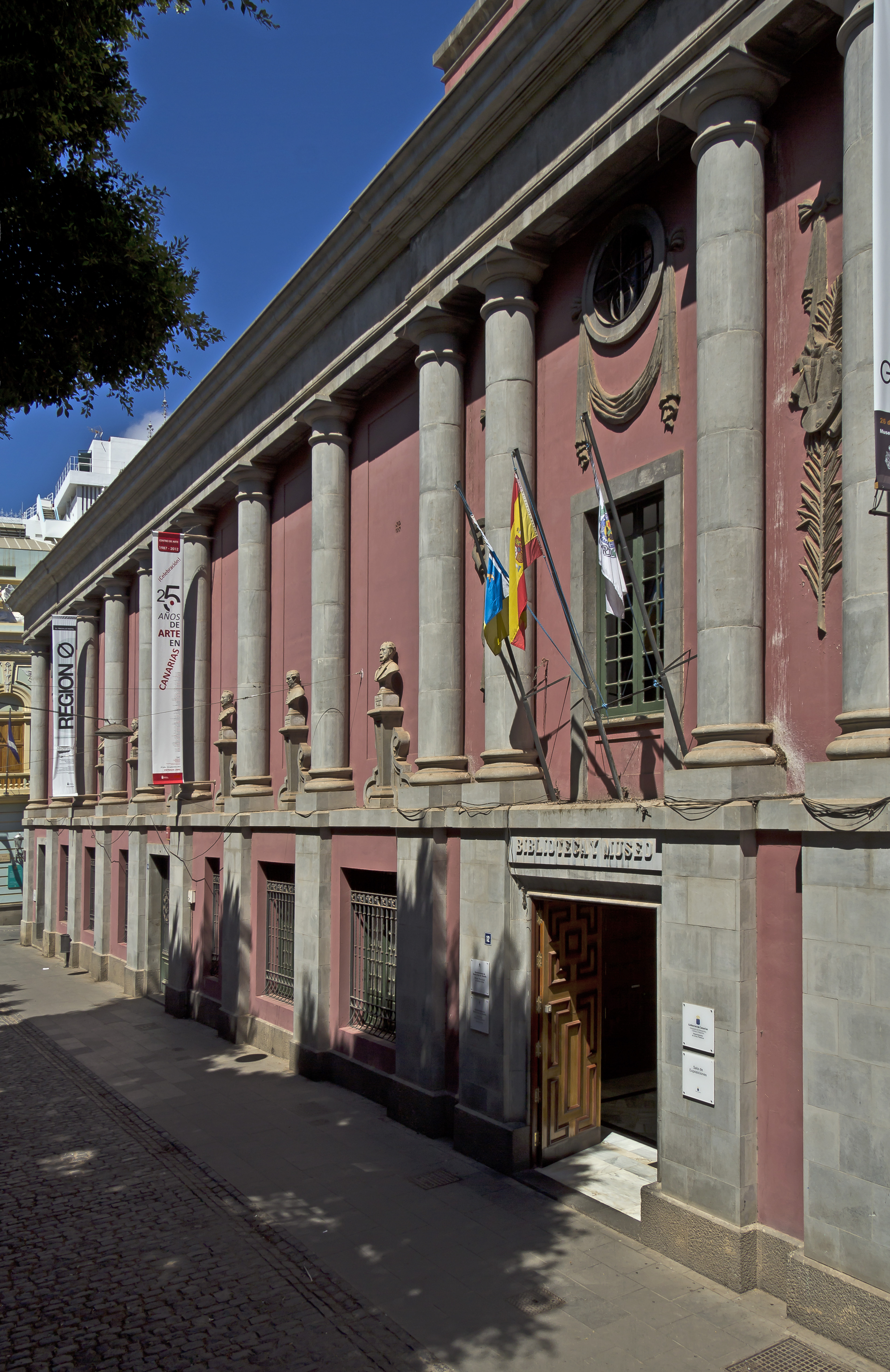 Das Museo de Bellas Artes wurde im Jahr 1929 auf dem Gelände des früheren Franziskanerklosters in Santa Cruz de Tenerife erbaut. Es liegt am östlichen Rand der Plaza del Príncipe. Der Architekt war Eladio Laredo Carranza.